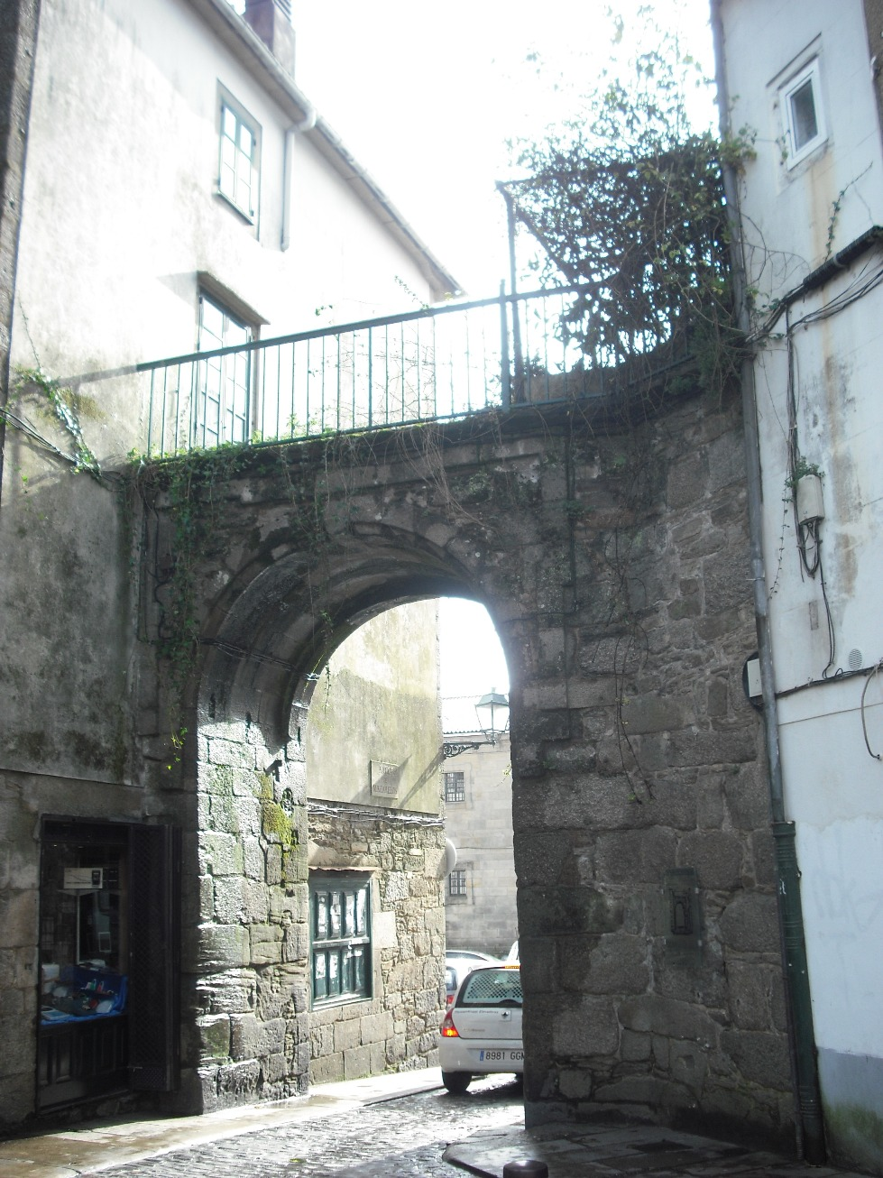 Arco de Mazarelos, única puerta que queda en pie de la antigua muralla de Santiago de Compostela